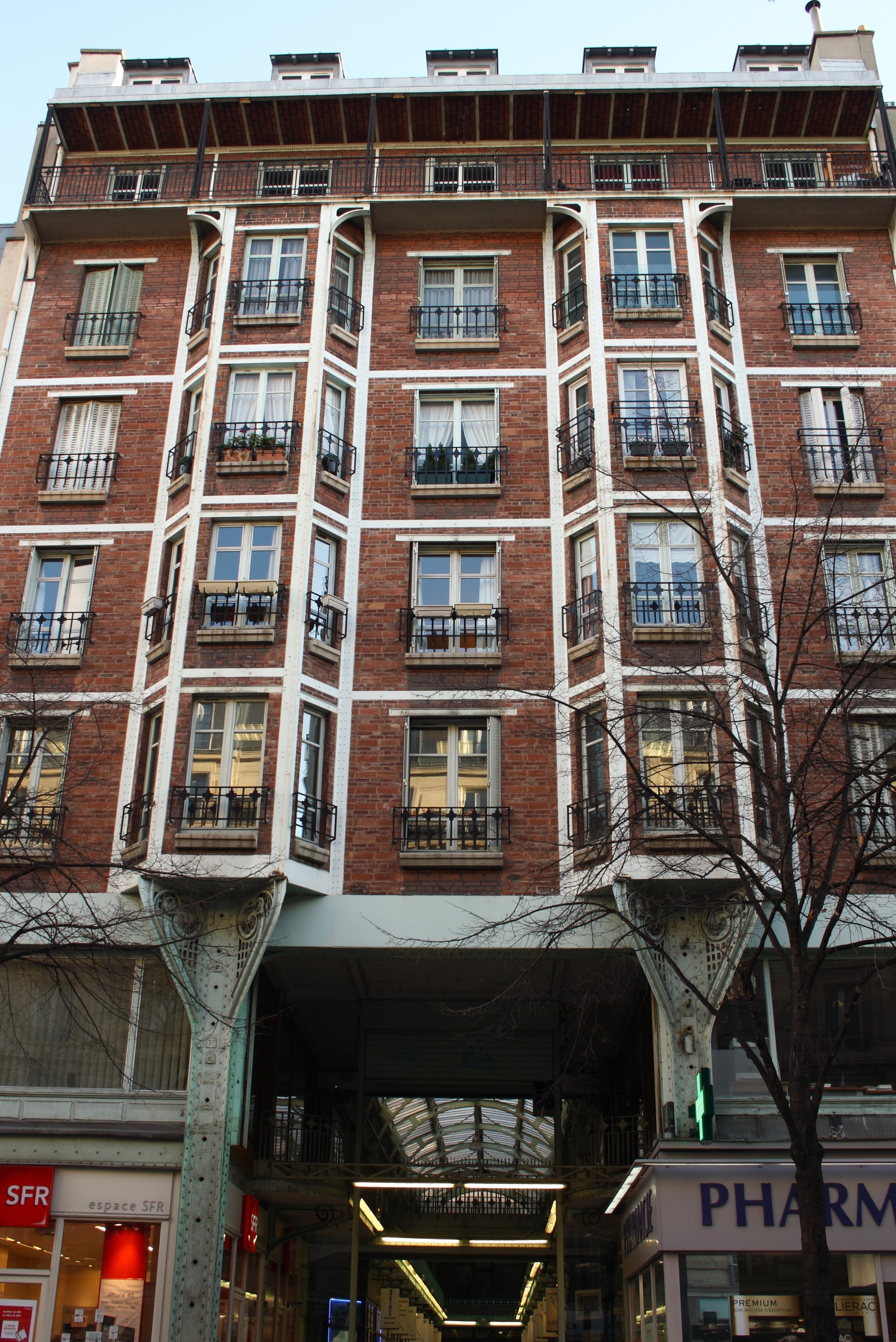 Cité de l'Argentine, 111, avenue Victor Hugo im 16. Arrondissement von Paris, Mietshaus und Einkaufspassage von Henri Sauvage, 1907 gebaut